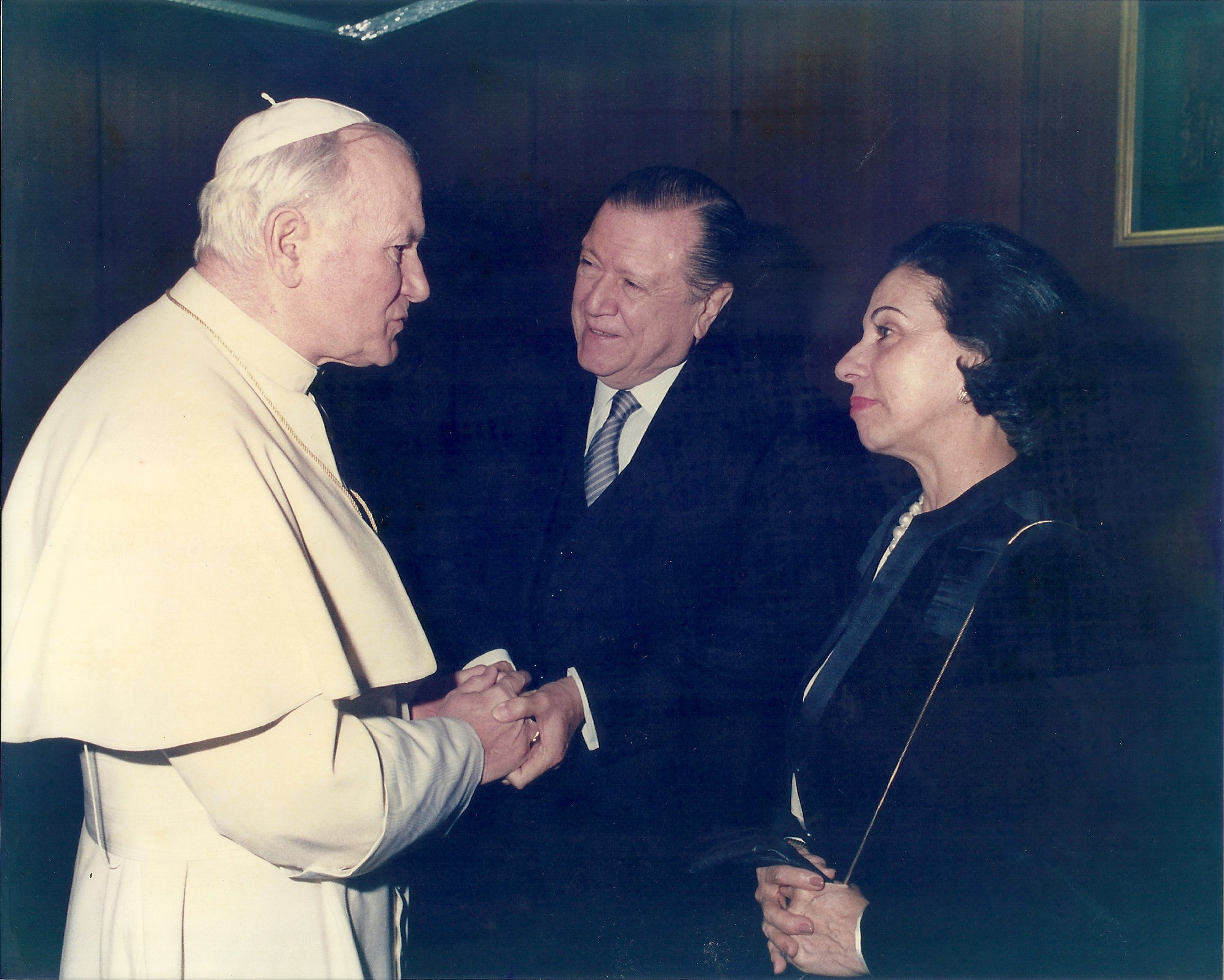 Rafael Caldera y Alicia Pietri en audiencia con el Papa Juan Pablo II.